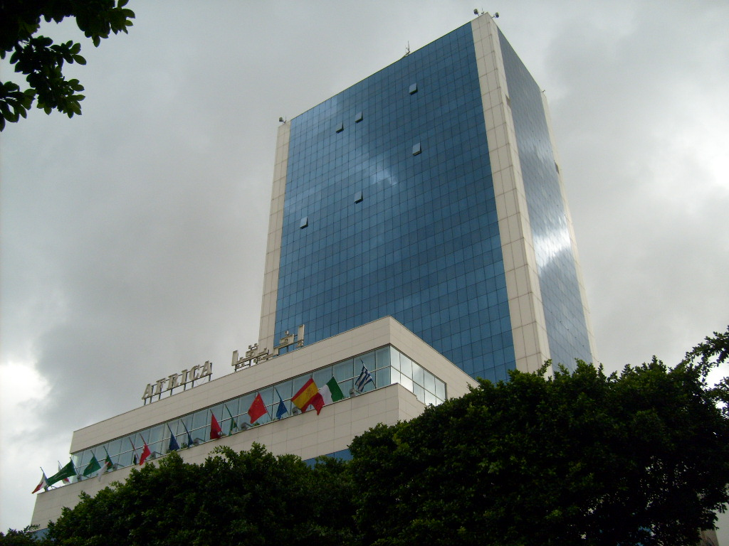 Tour de l'hôtel Africa dominant l'avenue Habib-Bourguiba de Tunis (Tunisie)